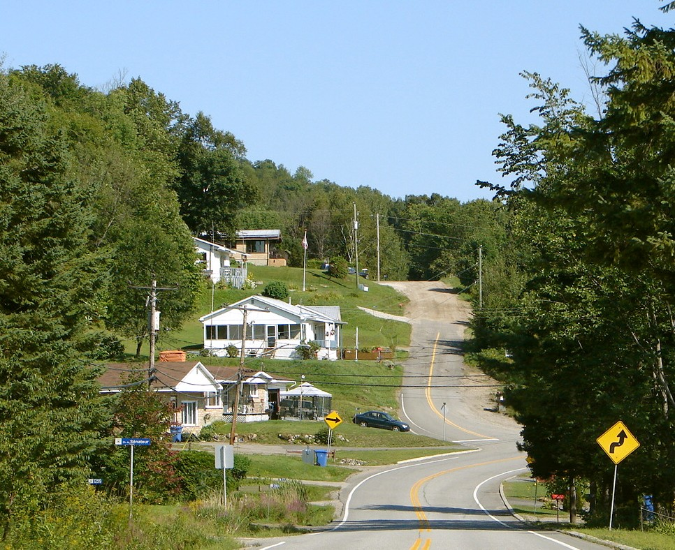 Saint-Pierre-de-Wakefield (Municipality of Val-des-Monts), Quebec, Canada